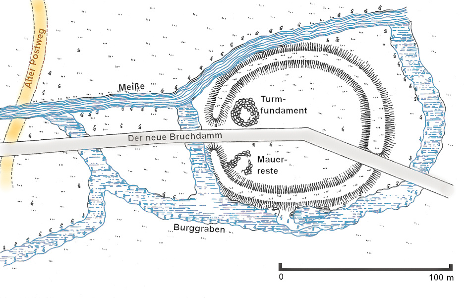 Skizze der Burg Hodenberg, gezeichnet von Wilhelm von Hodenberg Mitte des 19. Jahrhunderts